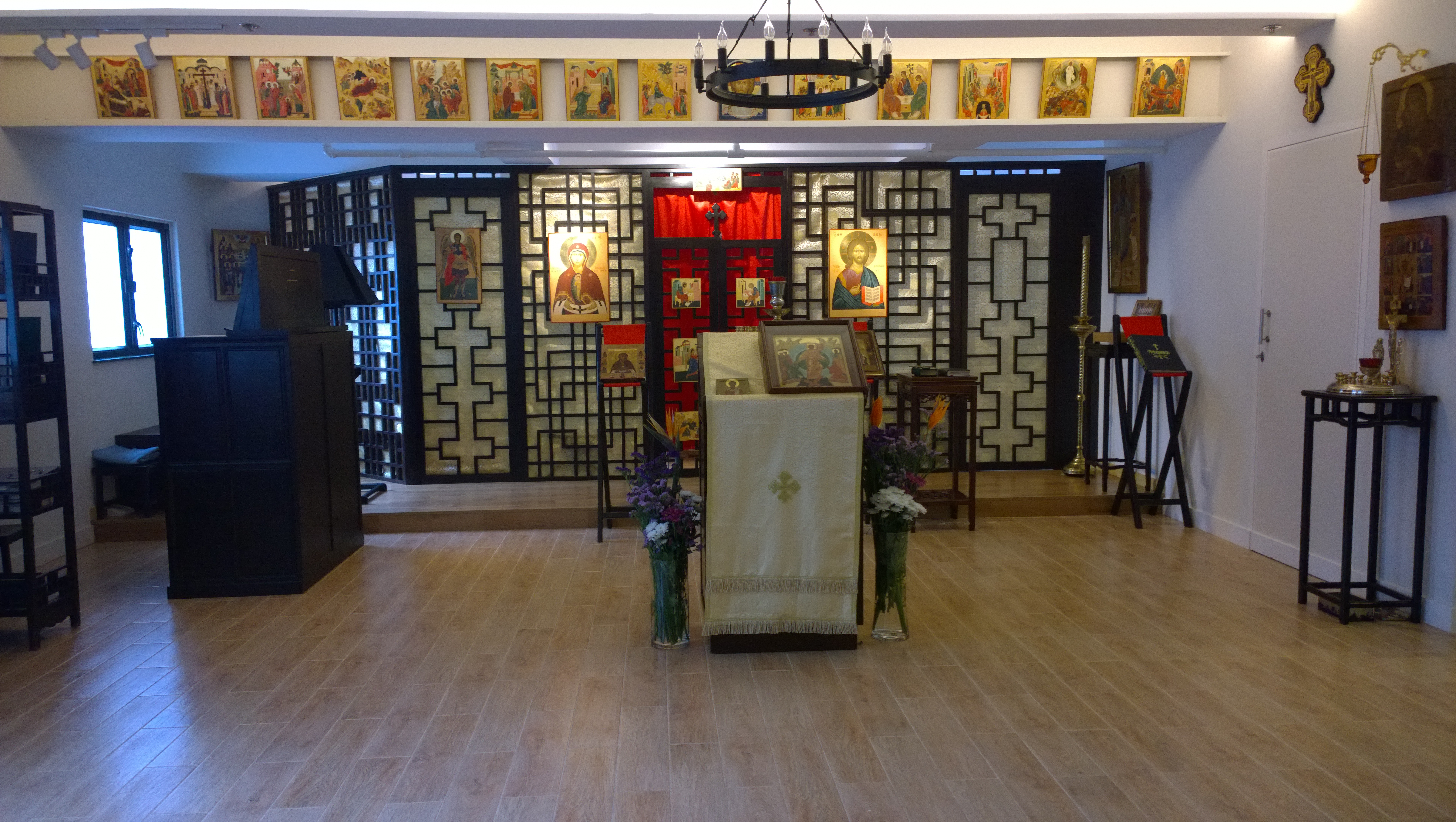 Церковь свв. Петра и Павла в Гонконге